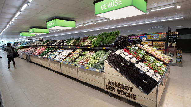 Der neue Obst und Gemüse Stand von Aldi Süd im neuen Design